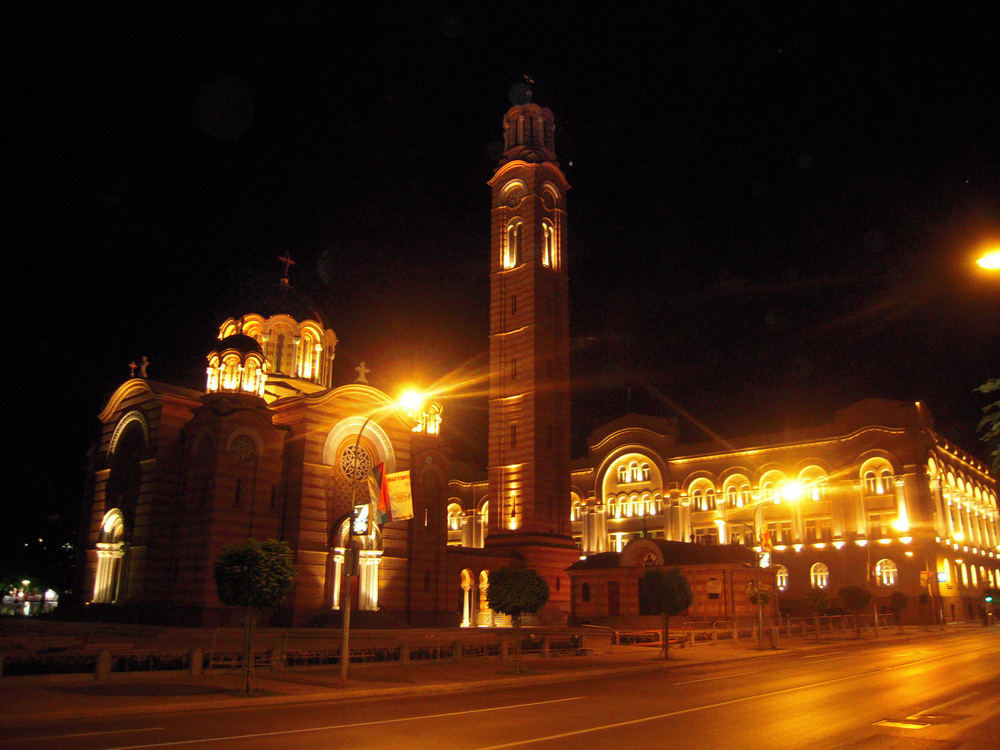 Chrám christa spasitele a městský palác